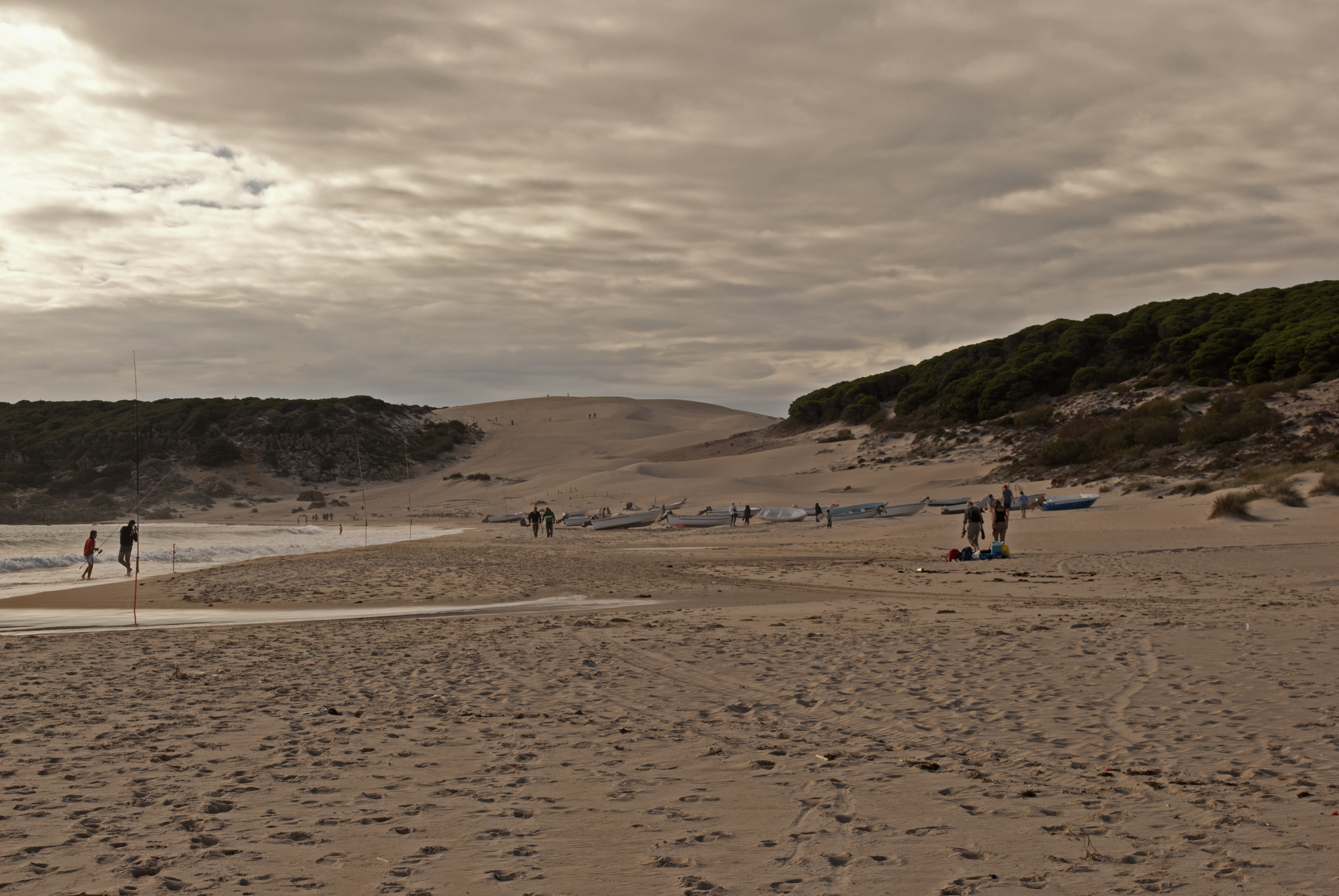 Playa de Bolonia, Tarifa (Cádiz) España